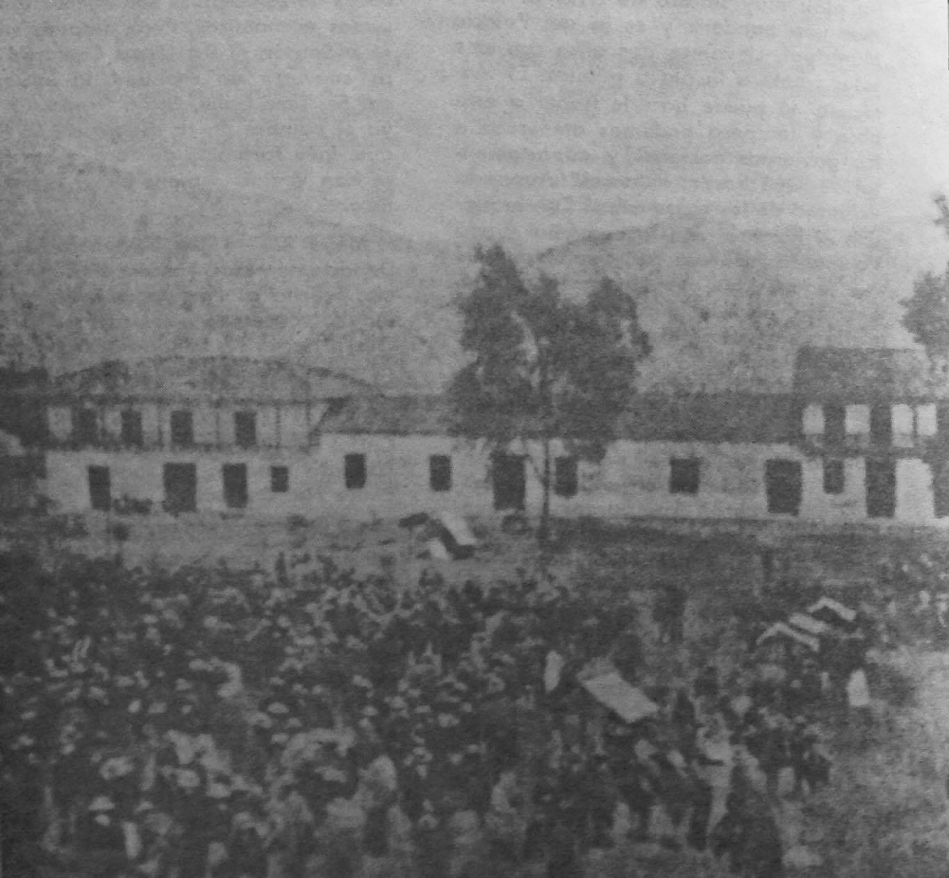 Aspecto de la plaza principal de Sonsón en 1872